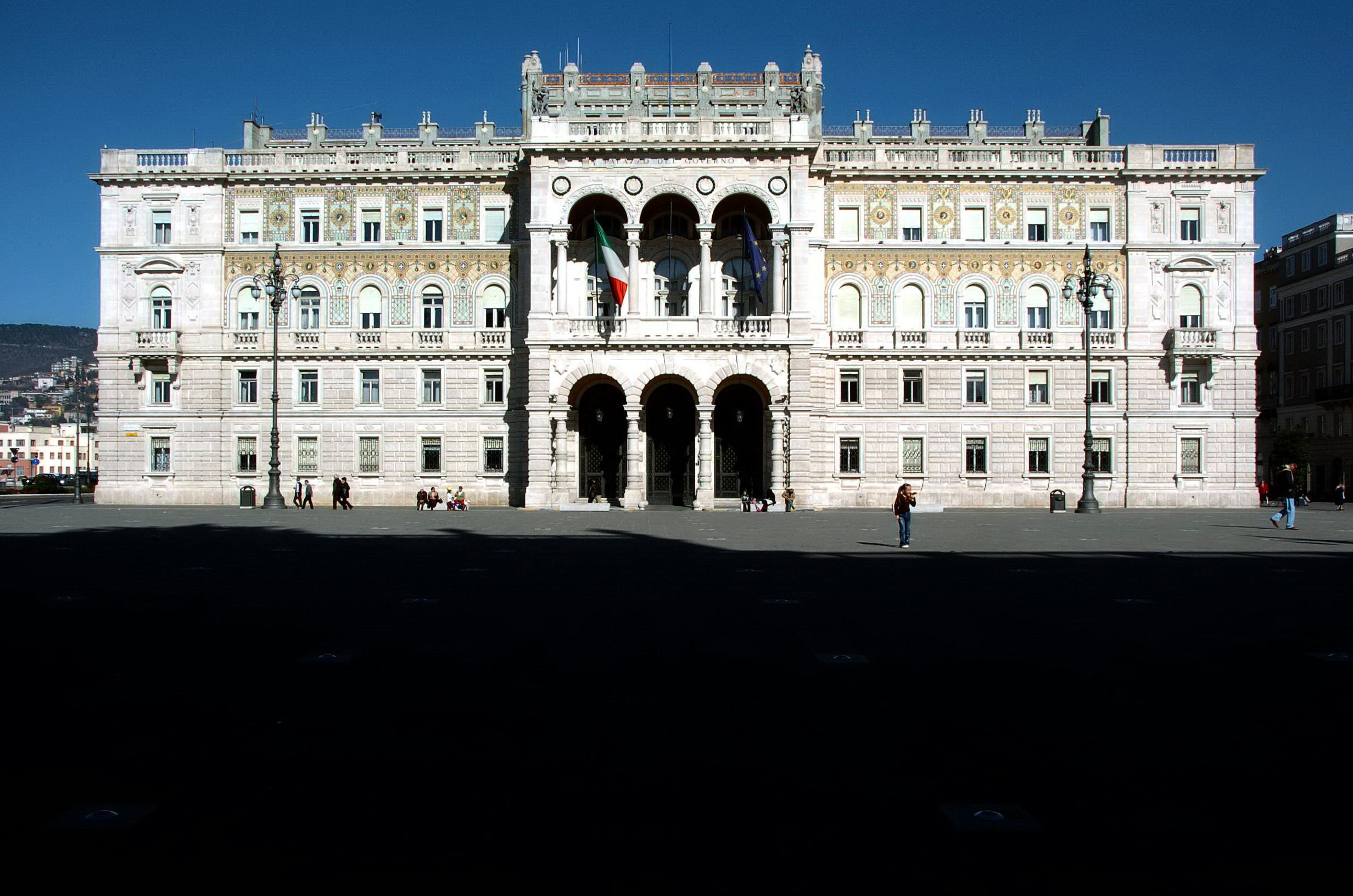 Palazzo del Governo, Trieste, Italy